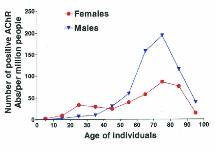 Incidentie MG naar leeftijd